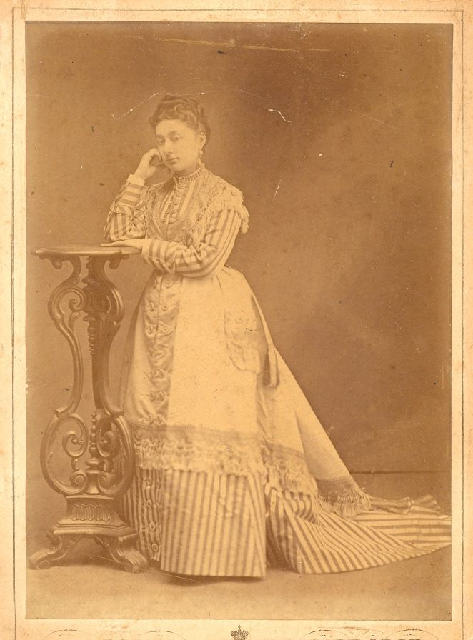 Саломея принцесса Мюрат